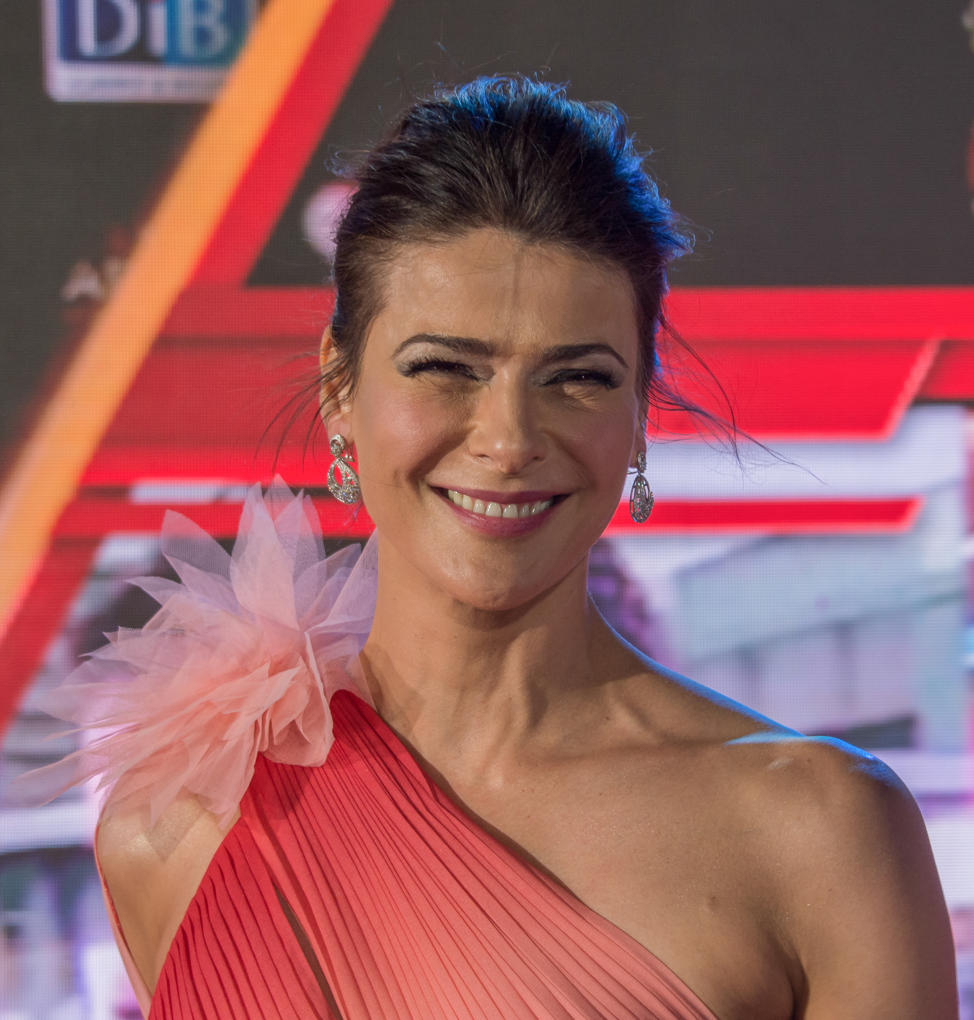 Tonka Tomicic, Copihue de Oro 2018, Sun Monticello, Mostazal, Región de O'Higgins, Chile